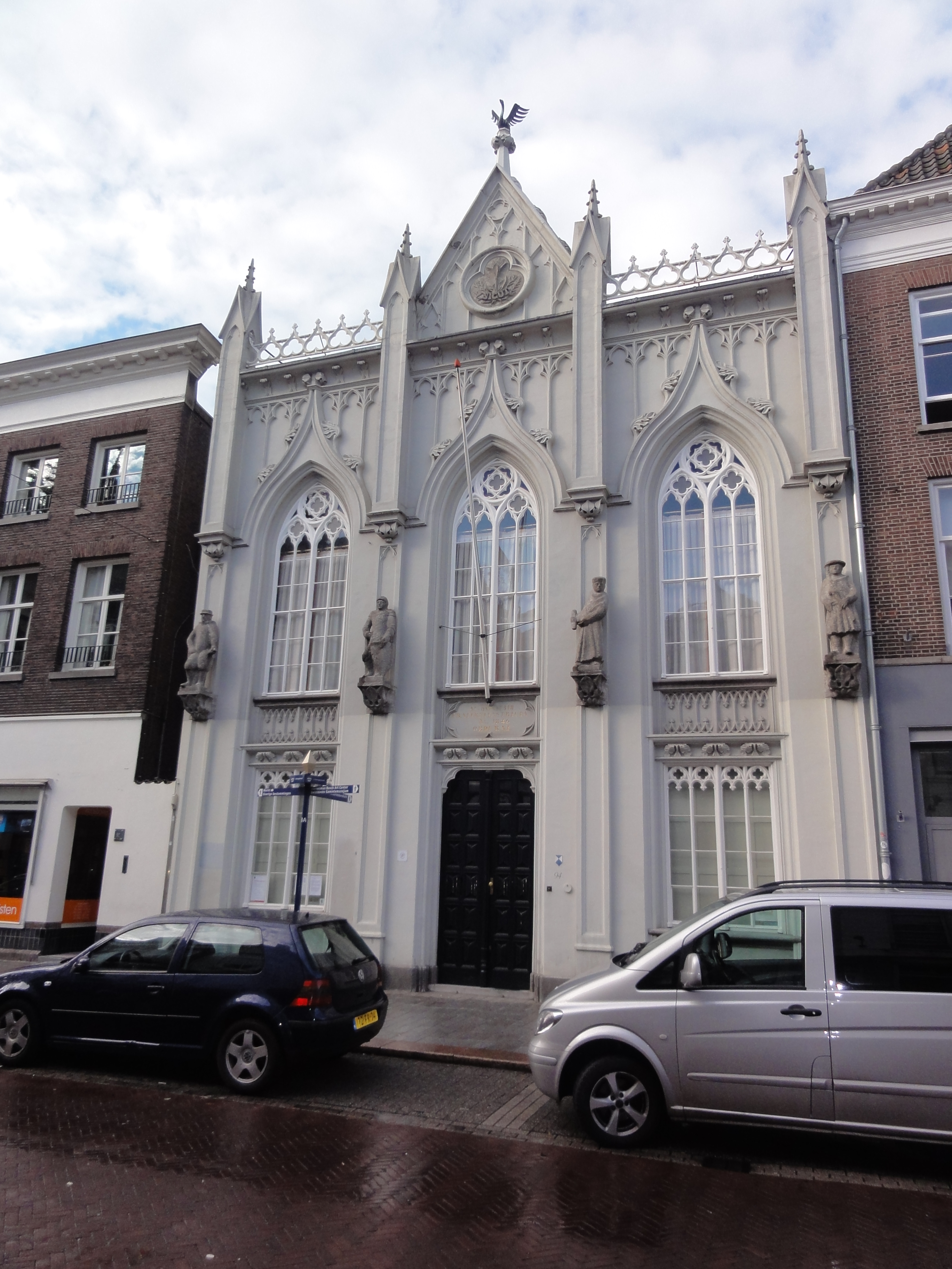 's-Hertogenbosch Rijksmonument 21635 Hinthamerstraat 94 't zwanenhuis 57″ N, 5° 18′ 35.04″ E Object location51° 41′ 19.4″ N, 5° 18′ 34.25″ E